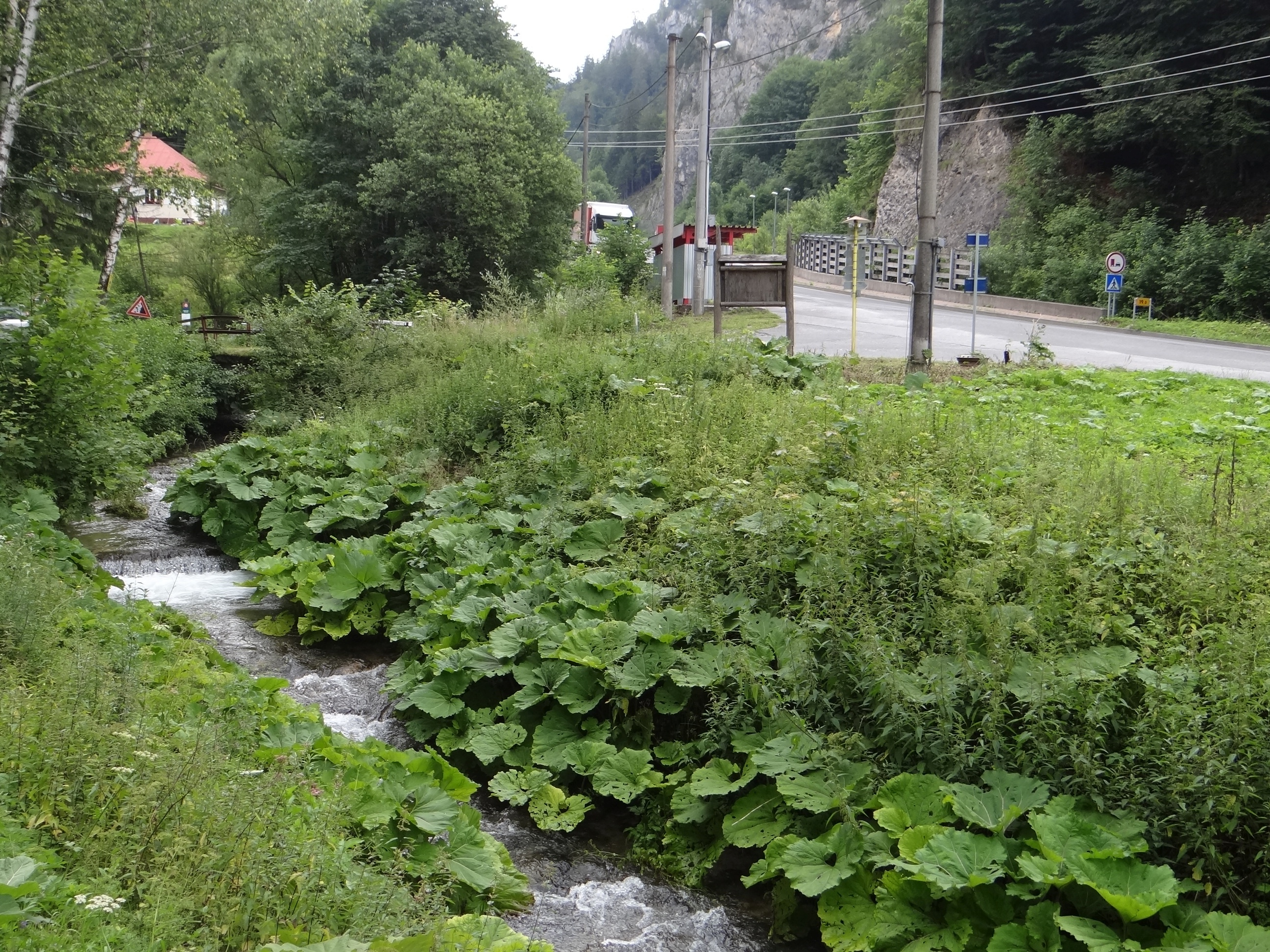 Horný Jelenec. Starohrský potok